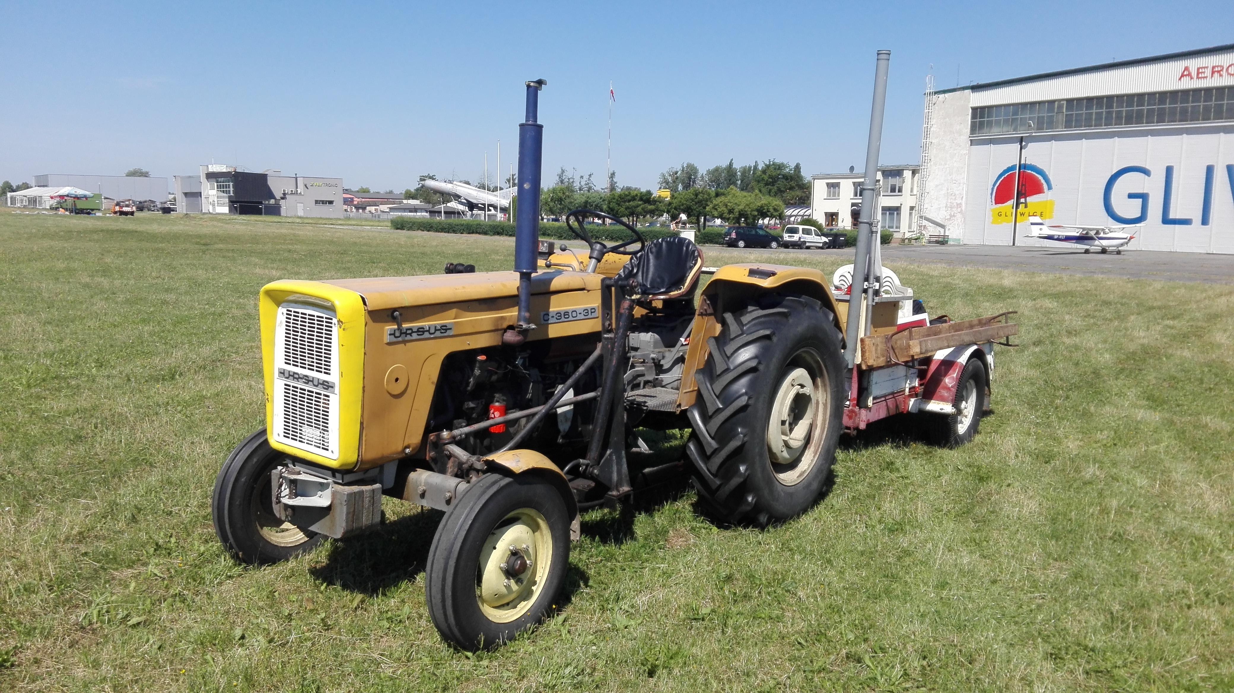 Ursus C-360-3P